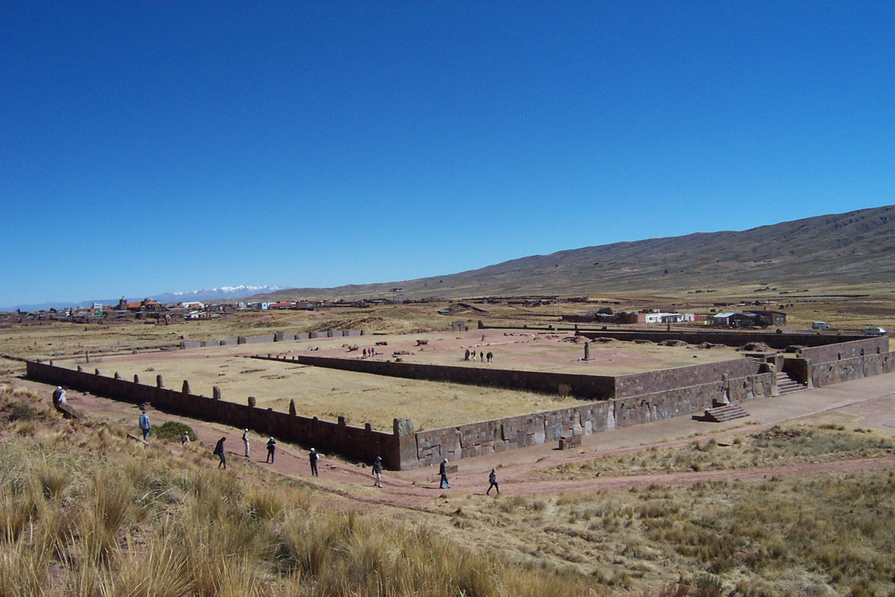 Eigen foto